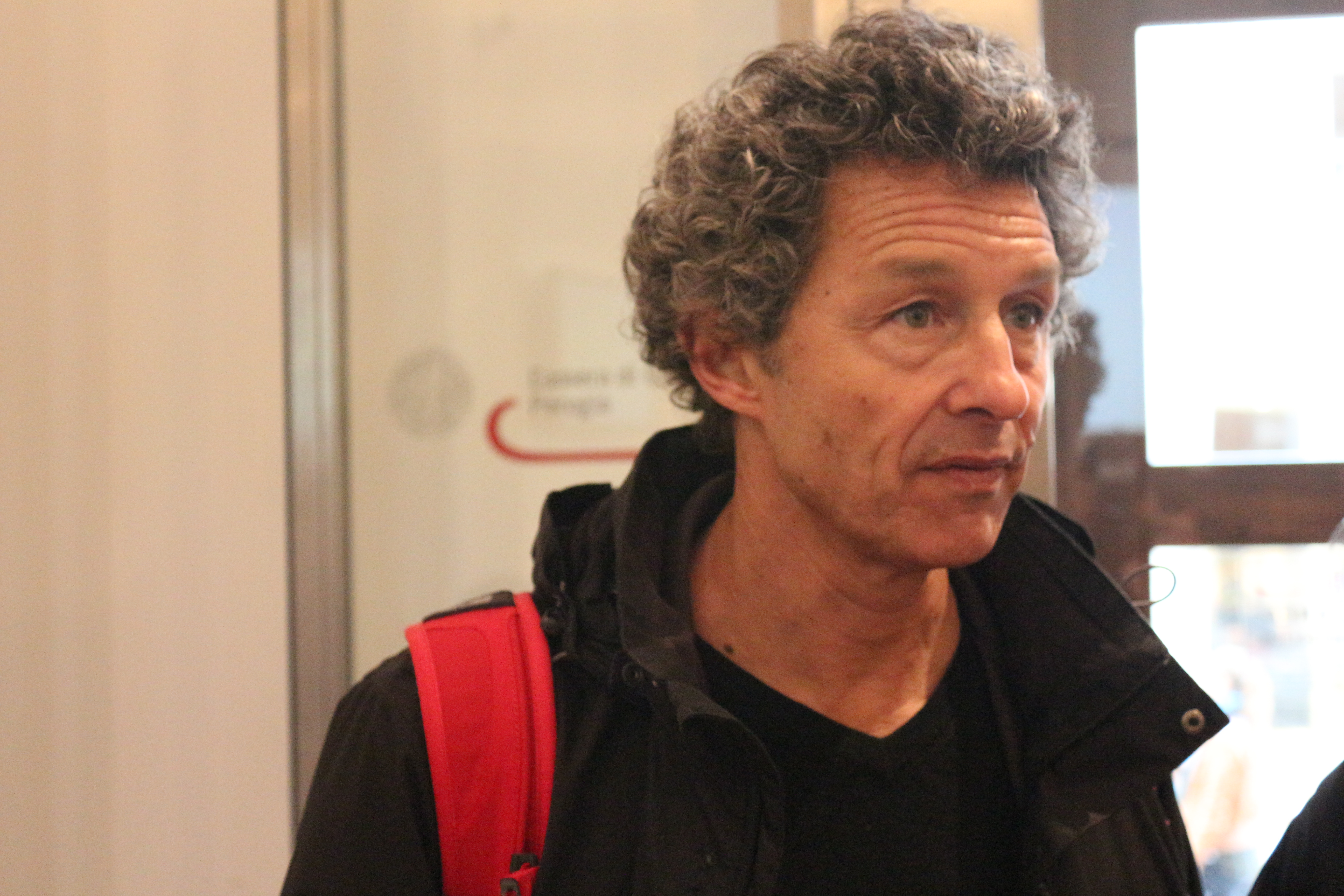 Lorenzo Pavolini, scrittore italiano